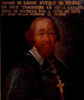 Portrait de Renaud de Baune